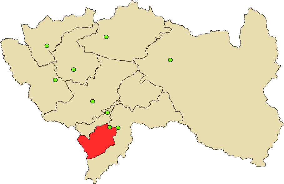 Mapa de Provincia de Chupaca en Perú